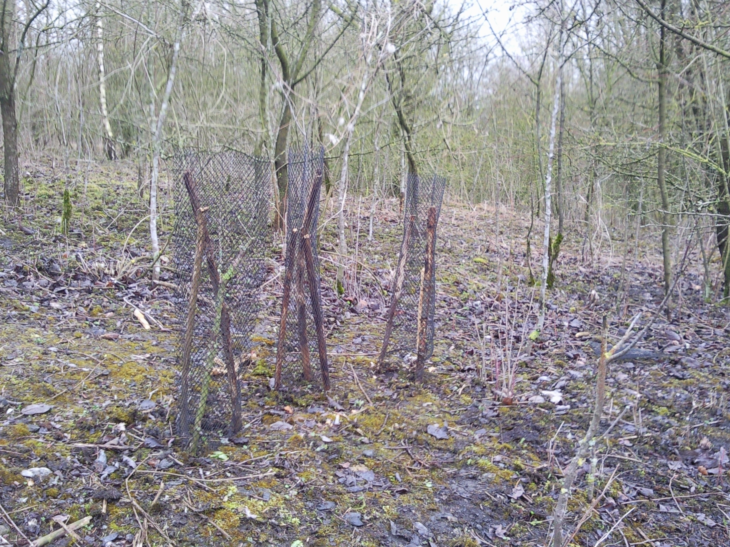 dispositif de protection des plantules d'Aceras homme-pendu